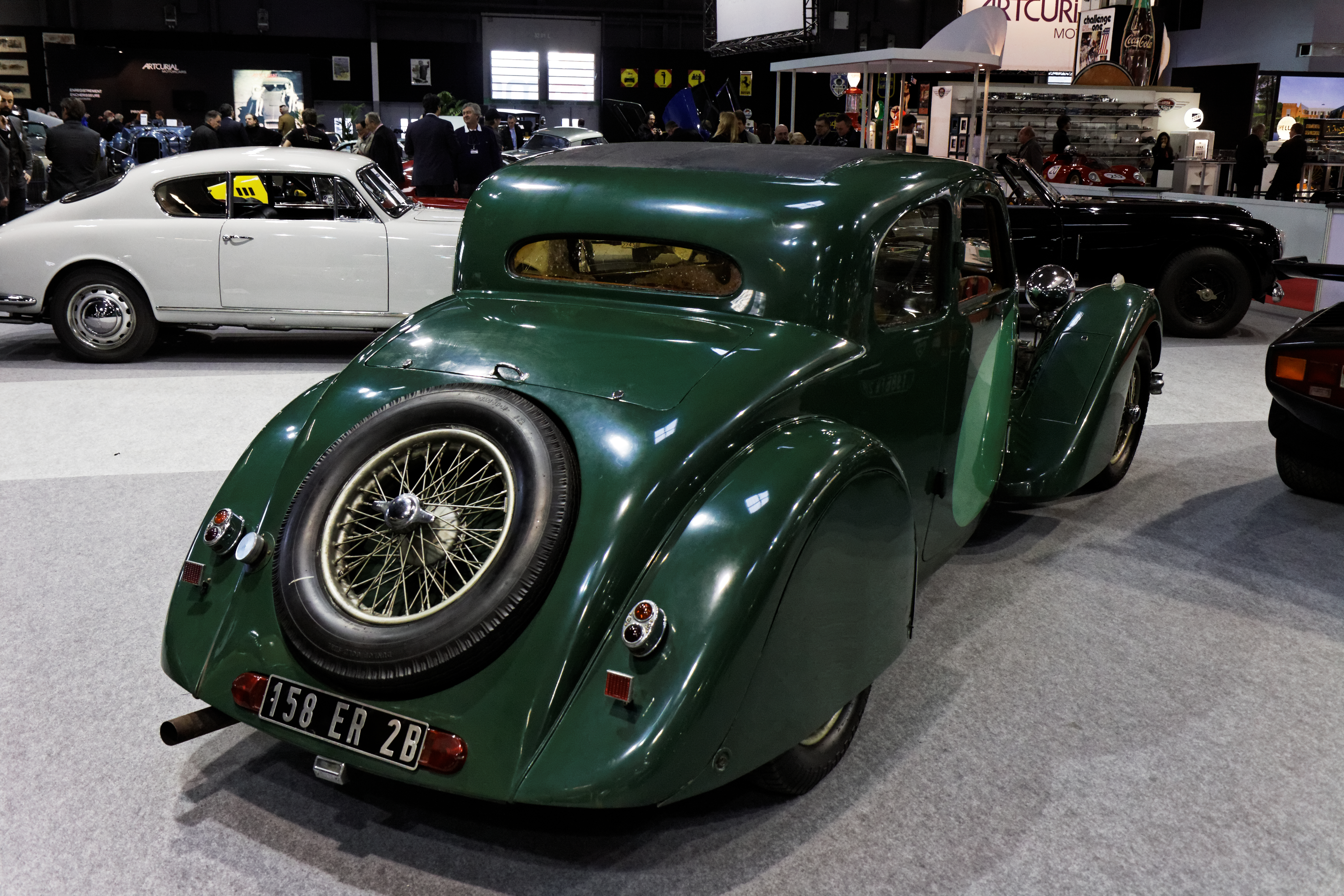 Une Bugatti 57 Coach Ventoux présentée lors du salon Retromobile 2013.